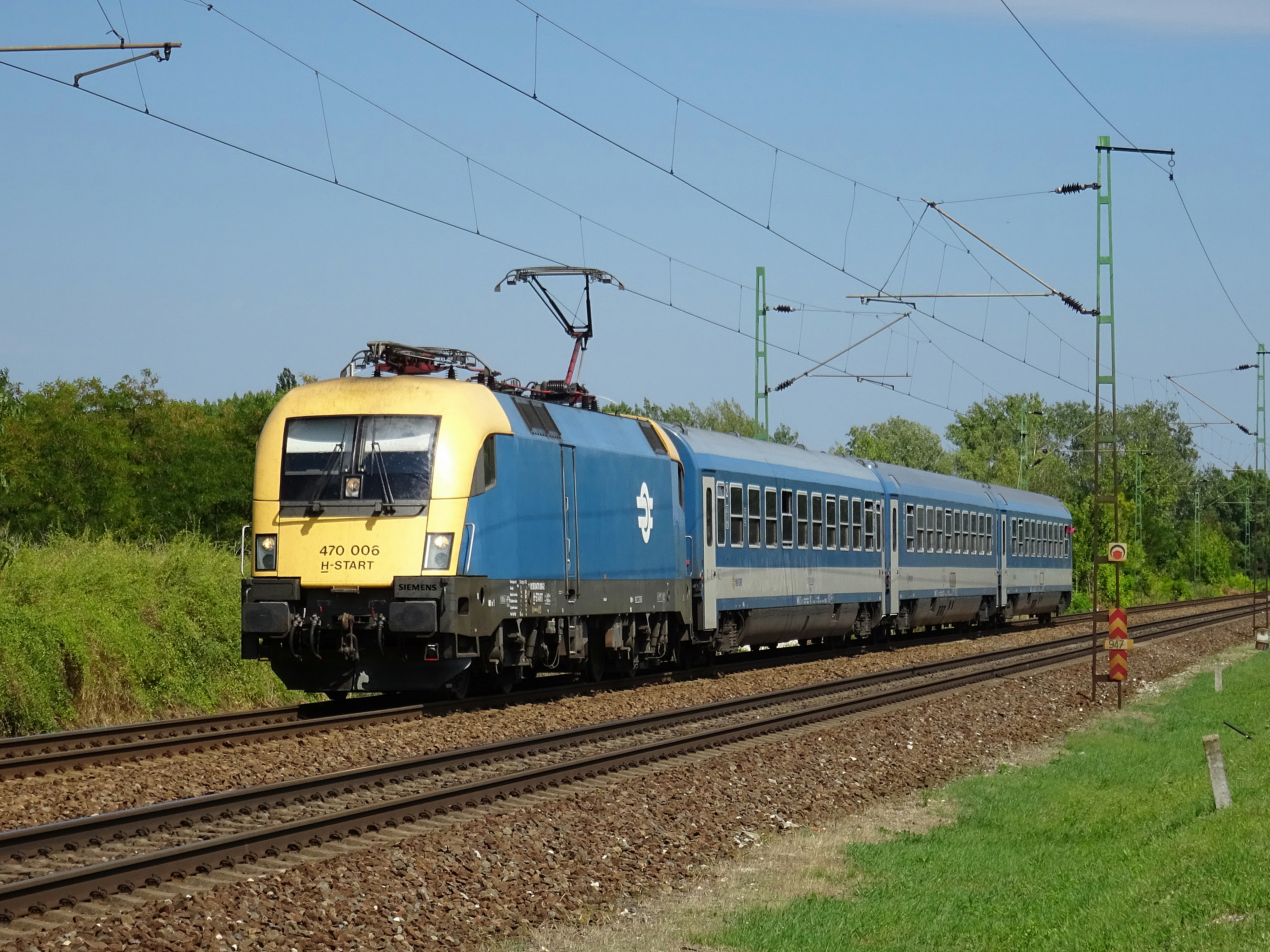 A MÁV-START 470 006-os pályaszámú mozdonya ai IC924 számú Alpokalja Intercity vonattal Szőnynél.